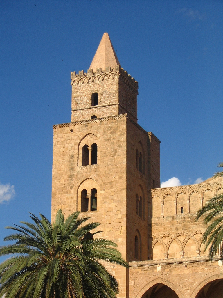 Cefalù, Sicilia, Italia